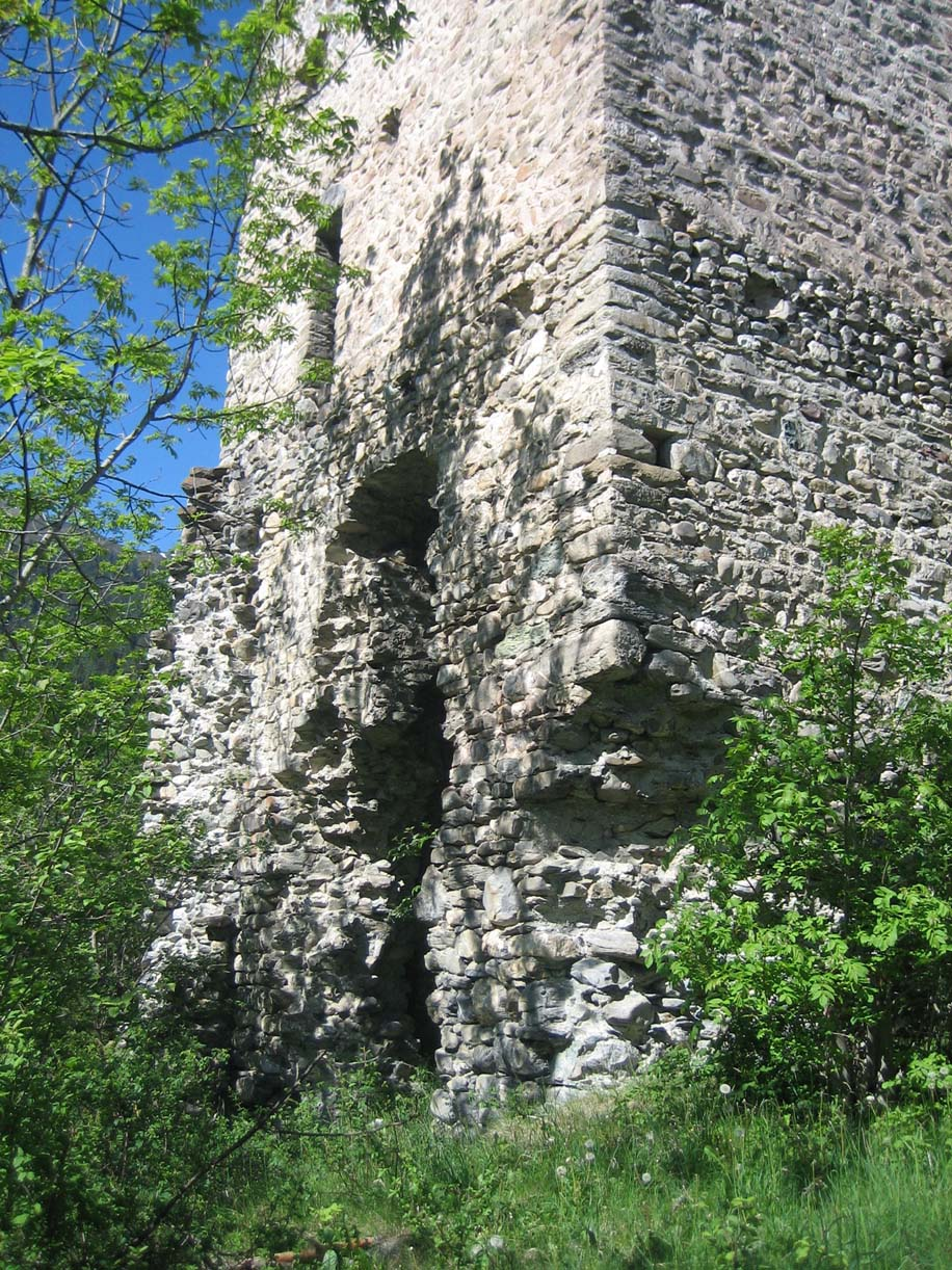 Turmfuss